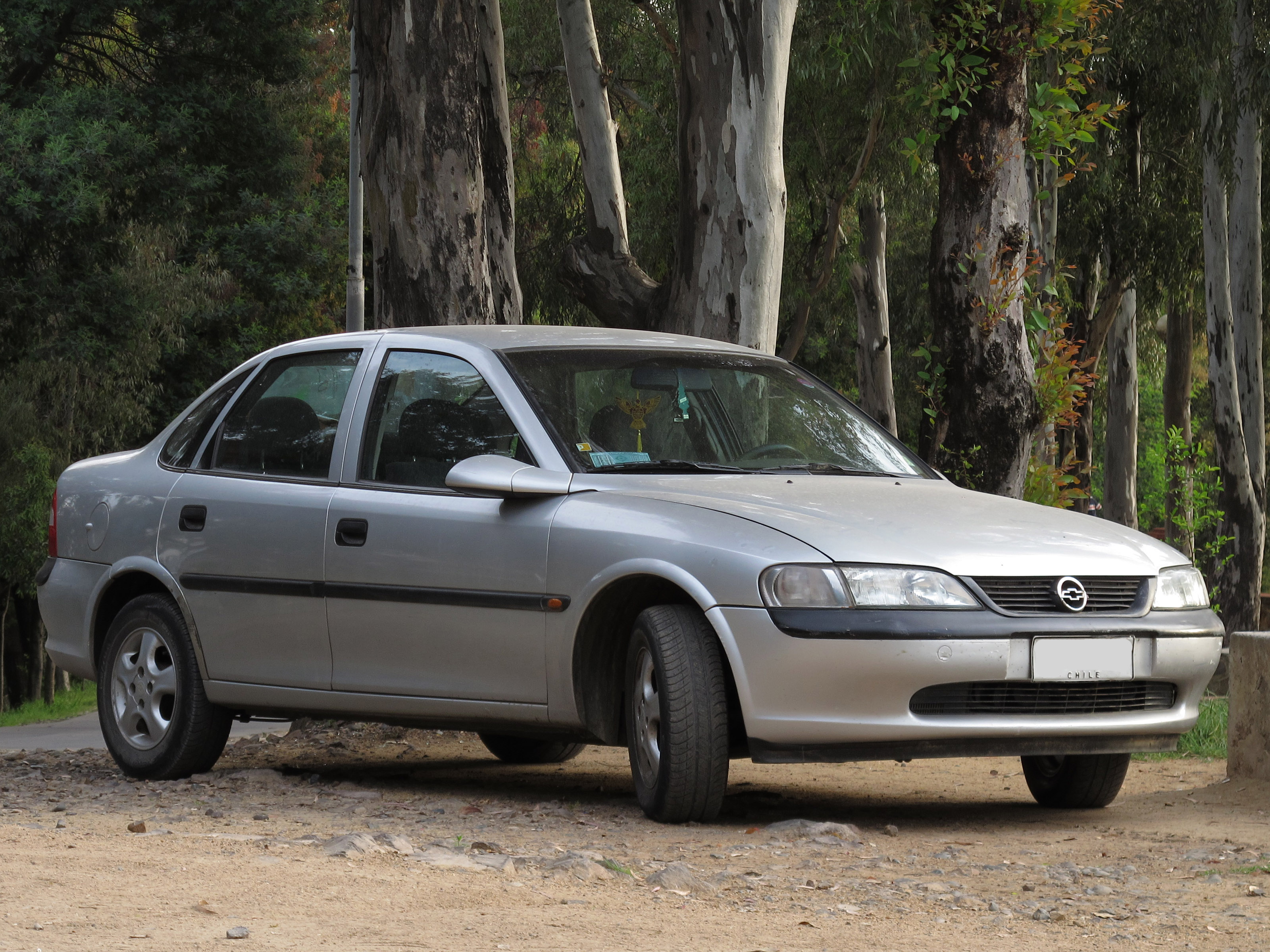 Chevrolet Vectra 1.8 1999